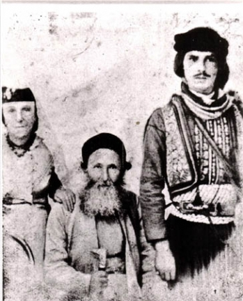 Rabby Consul Yakov Hay Abbo & wife with body guard הרב הקונסול יעקב חי עבו ורעייתו עם הקוואס, שומר הראש התורכי